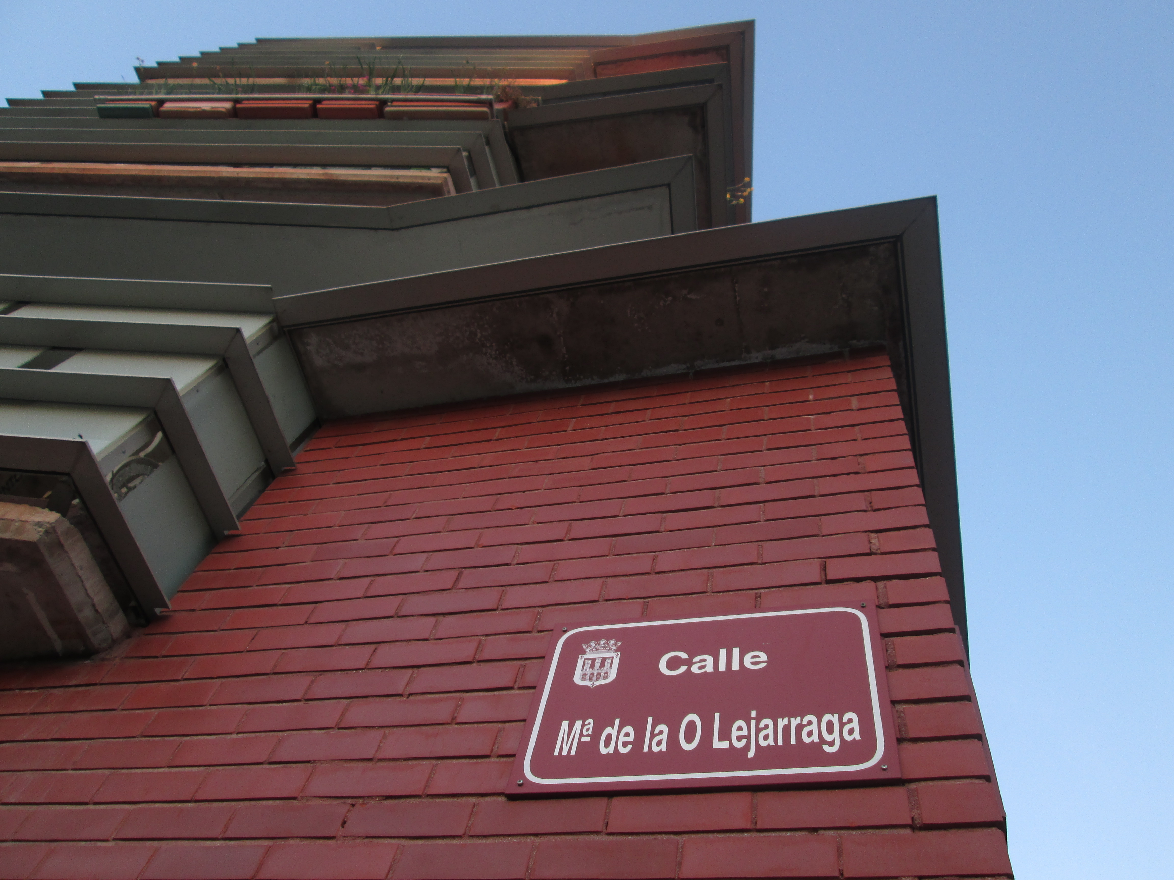 Imagen de la Calle María de la O Lejárraga en Logroño (La Rioja, España).